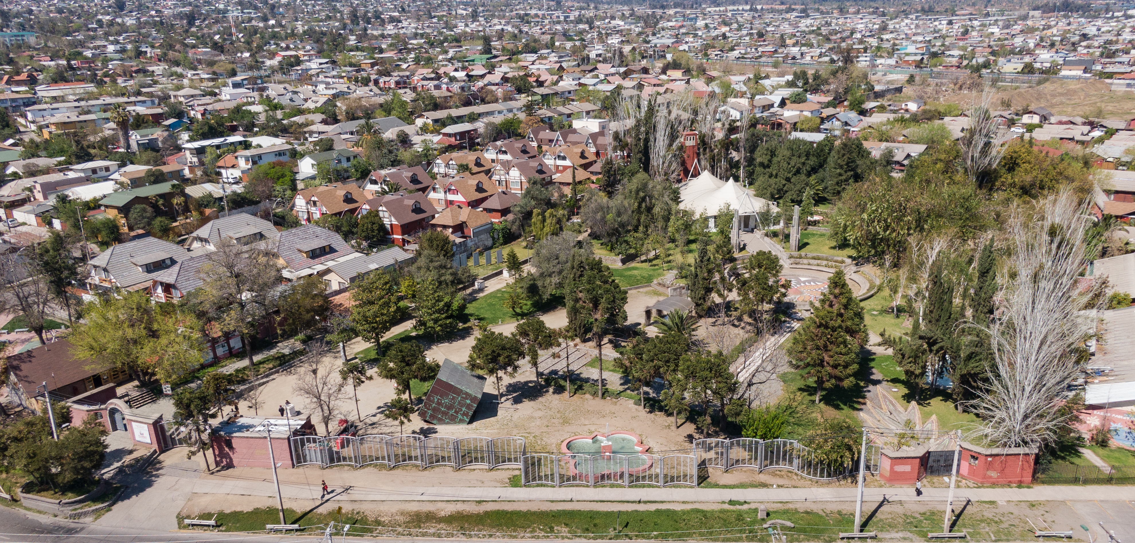 El sitio de memoria Parque por la Paz Villa Grimaldi se encuentra ubicado en Avenida José Arrieta 8401, comuna de Peñalolén, Santiago, Chile